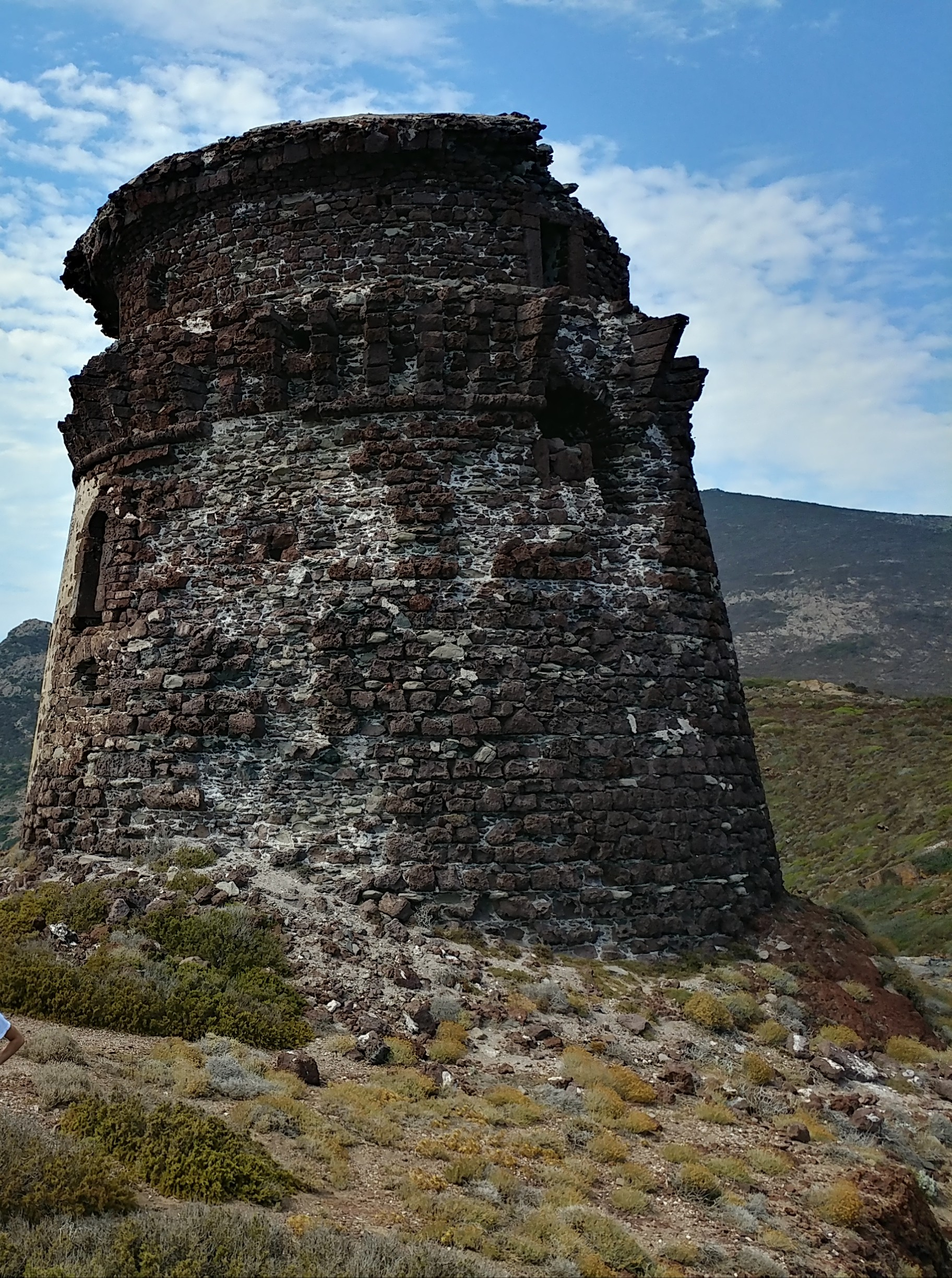 Torre dello Zenobito vista dall'esterno nel 2017